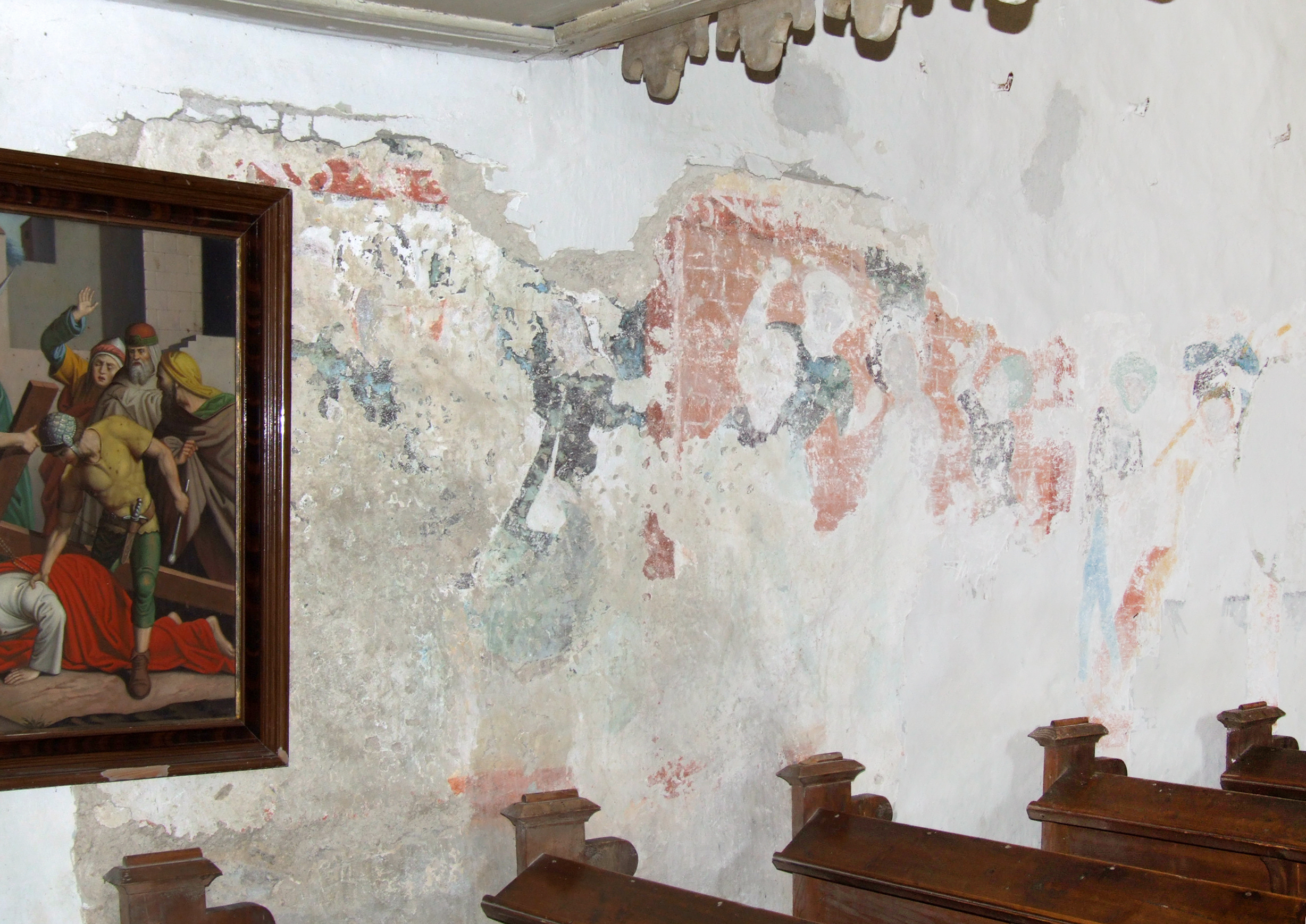 Kąty Bystrzyckie (Winkeldorf) - średniowieczne malowidło ścienne w miejscowym kościele